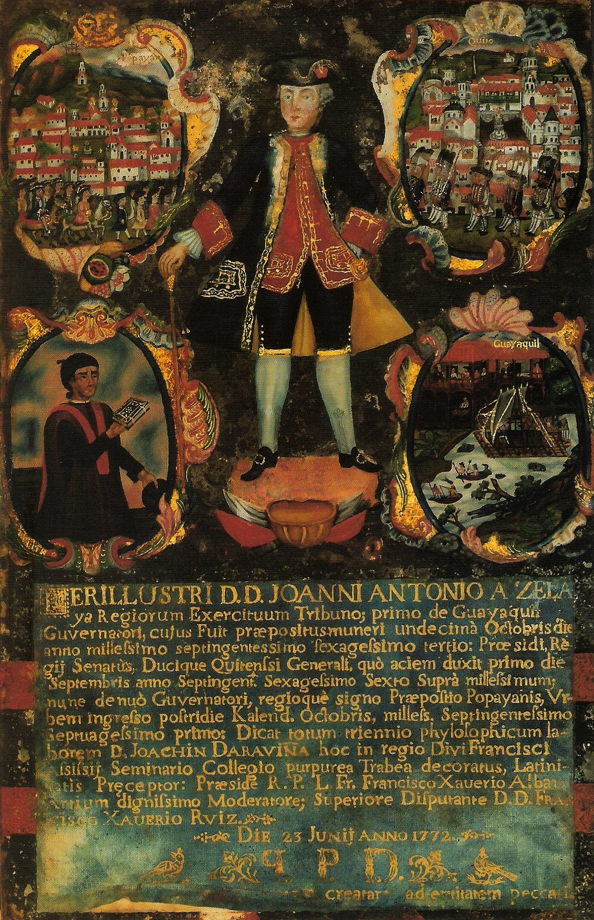 Cédula del Primer Gobernador de Quito, Juan Antonio Zelaya y Vergara, 1772